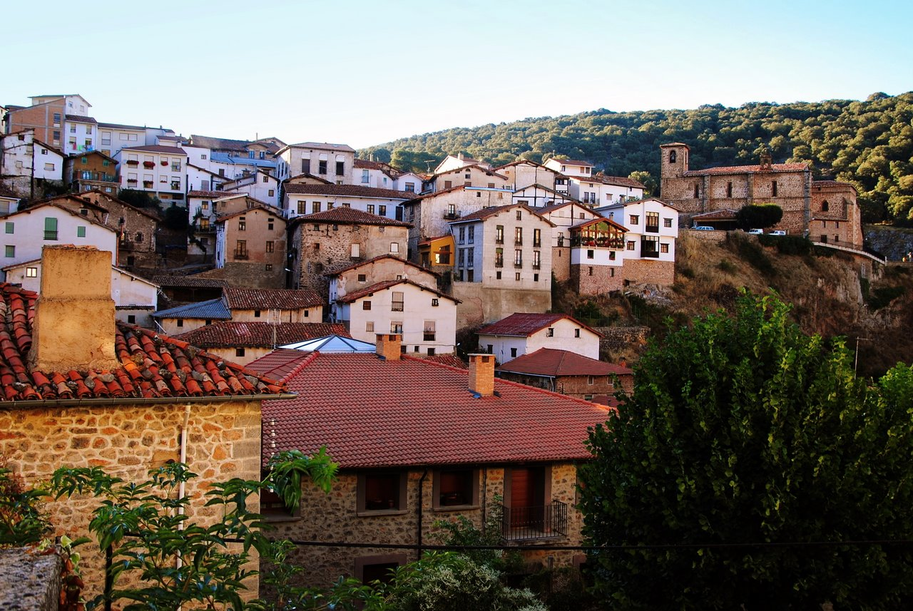 Pueblo cortado en dos